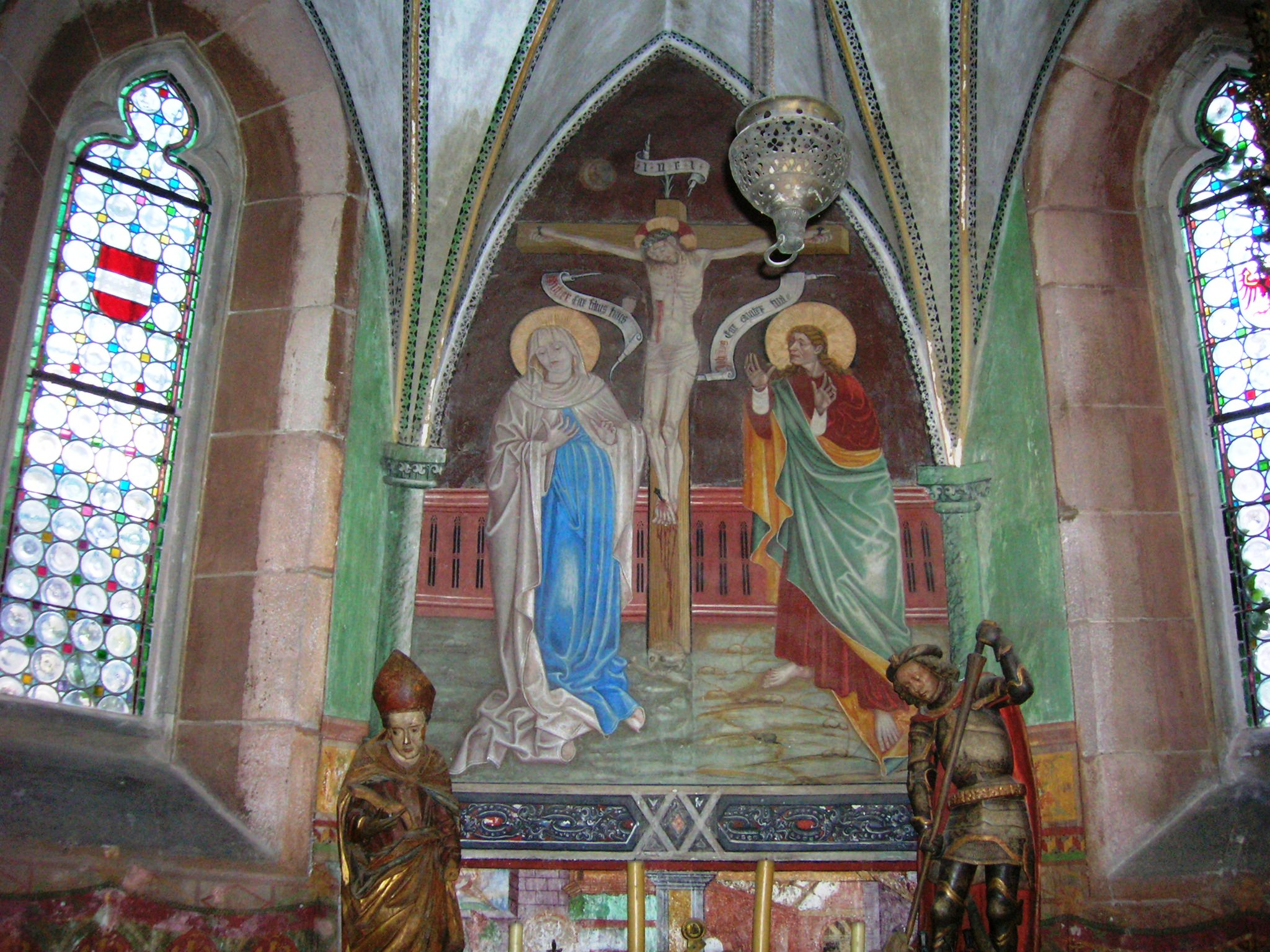 Castello Principesco